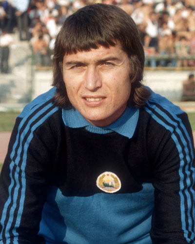 Dumitru Moraru playing for Romania